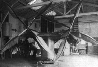 Eole III